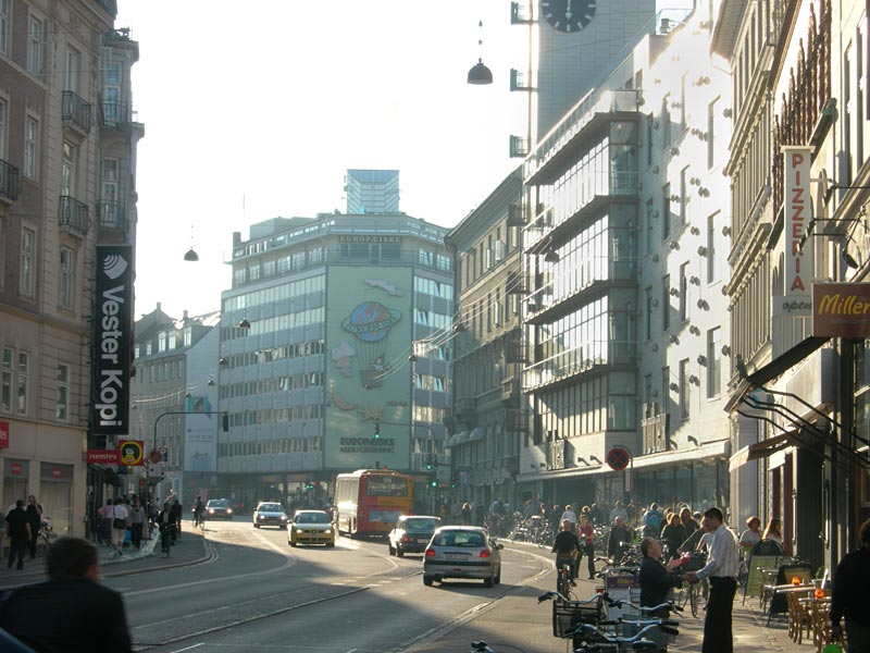 Vesterbrogade set fra nummer ca. 80 mod syd (lige efter Vesterbros torv, kiggende mod syd). Europæiske Rejseforsikrings facade i midten.